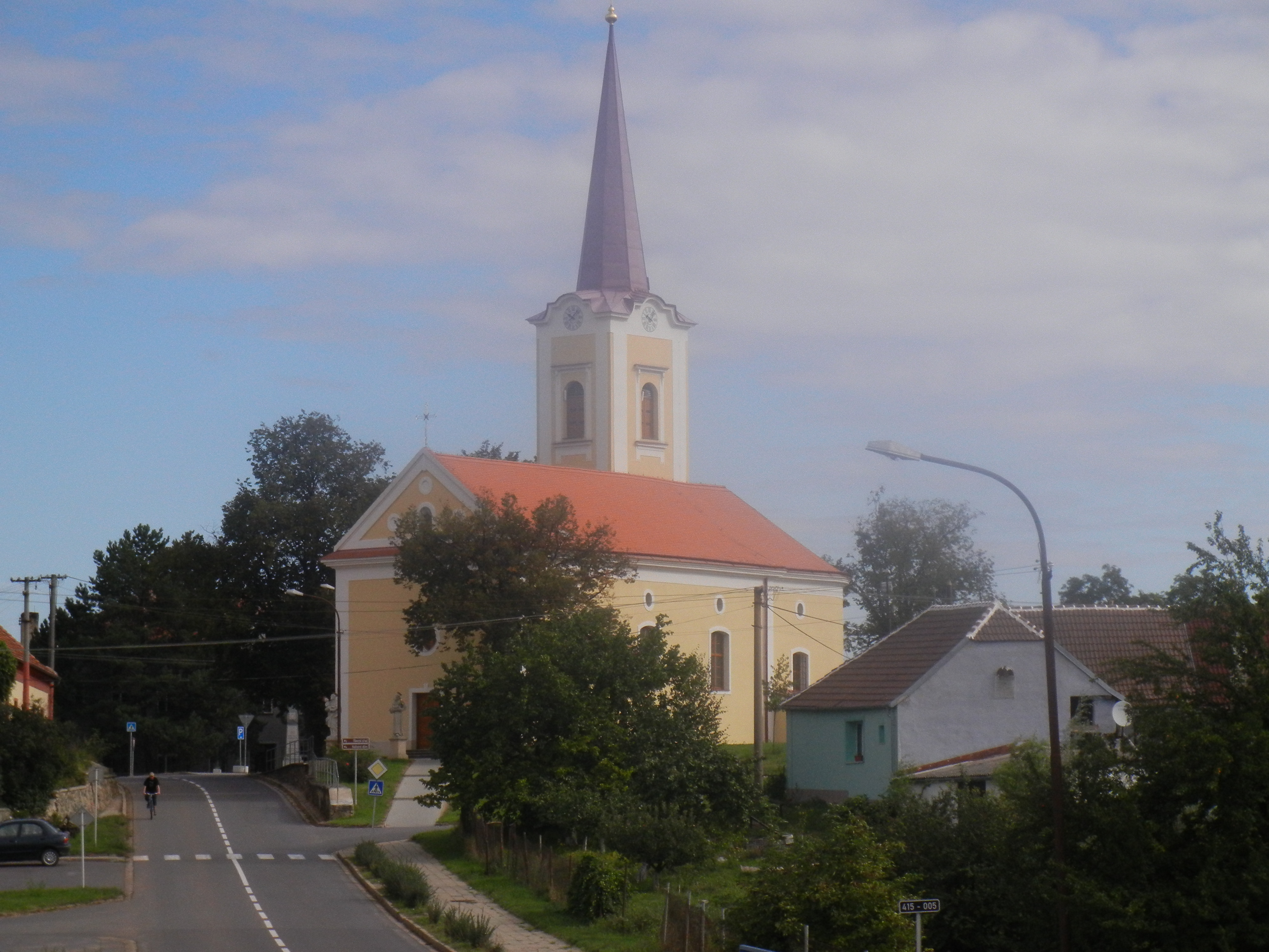 Kostel sv. Jiří (Litobratřice), Litobratřice